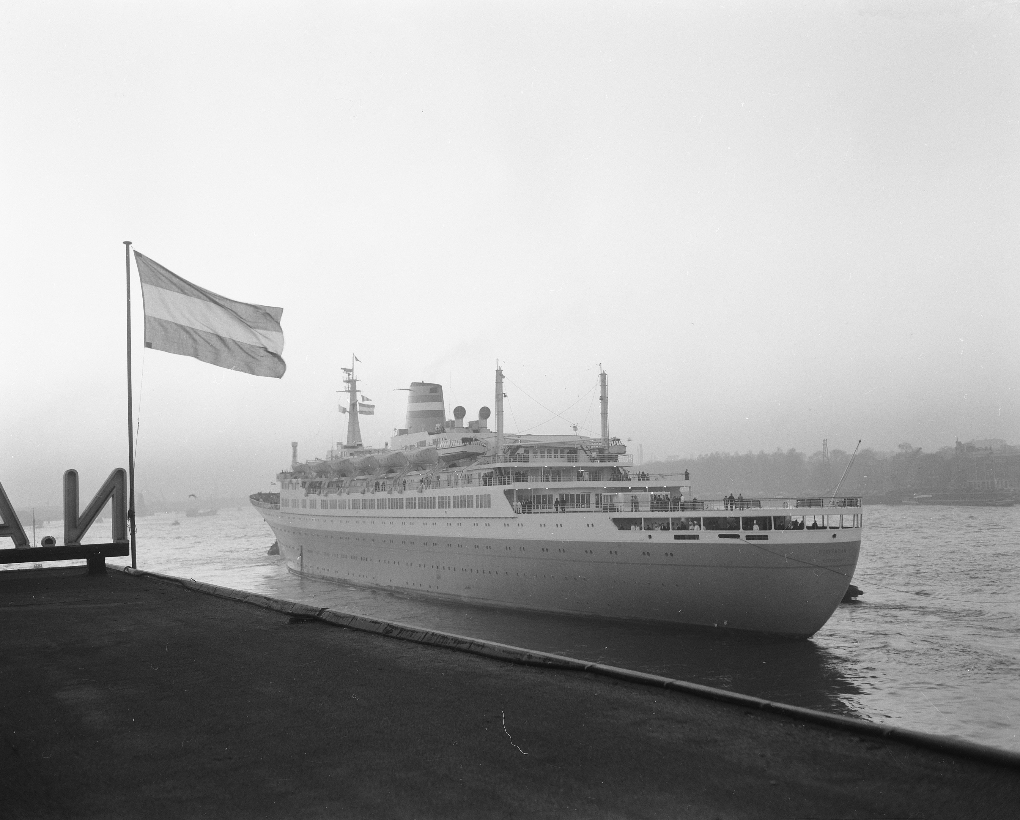 Collectie / Archief : Fotocollectie Anefo Reportage / Serie : Officiele proefvaart "Statendam" en doop door Prinses Beatrix Beschrijving : Officiele proefvaart "Statendam" en doop door Prinses Beatrix Datum : 23 januari 1957 Persoonsnaam : Beatrix, prinses Fotograaf : Bilsen, Joop van / Anefo Auteursrechthebbende : Nationaal Archief Materiaalsoort : Negatief (zwart/wit) Nummer archiefinventaris : bekijk toegang 2.24.01.04 Bestanddeelnummer : 908-2670